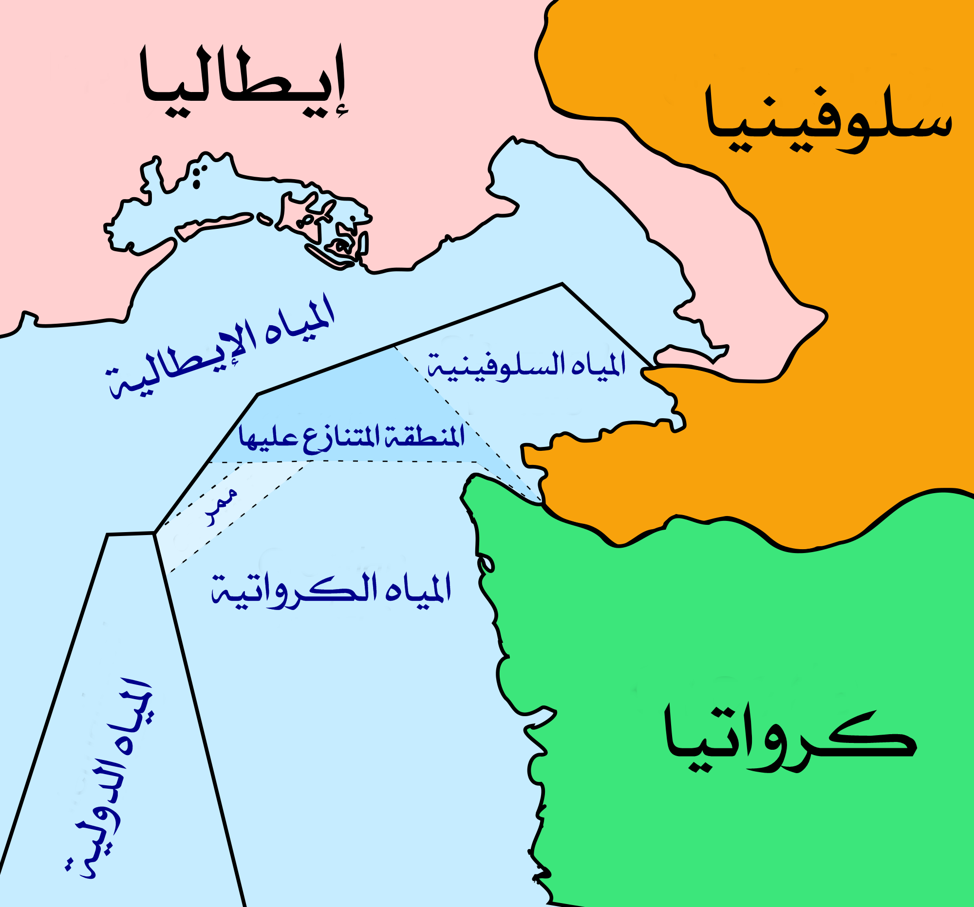 المنطقة البحرية المتنازع عليها بين كرواتيا وسولوفينيا